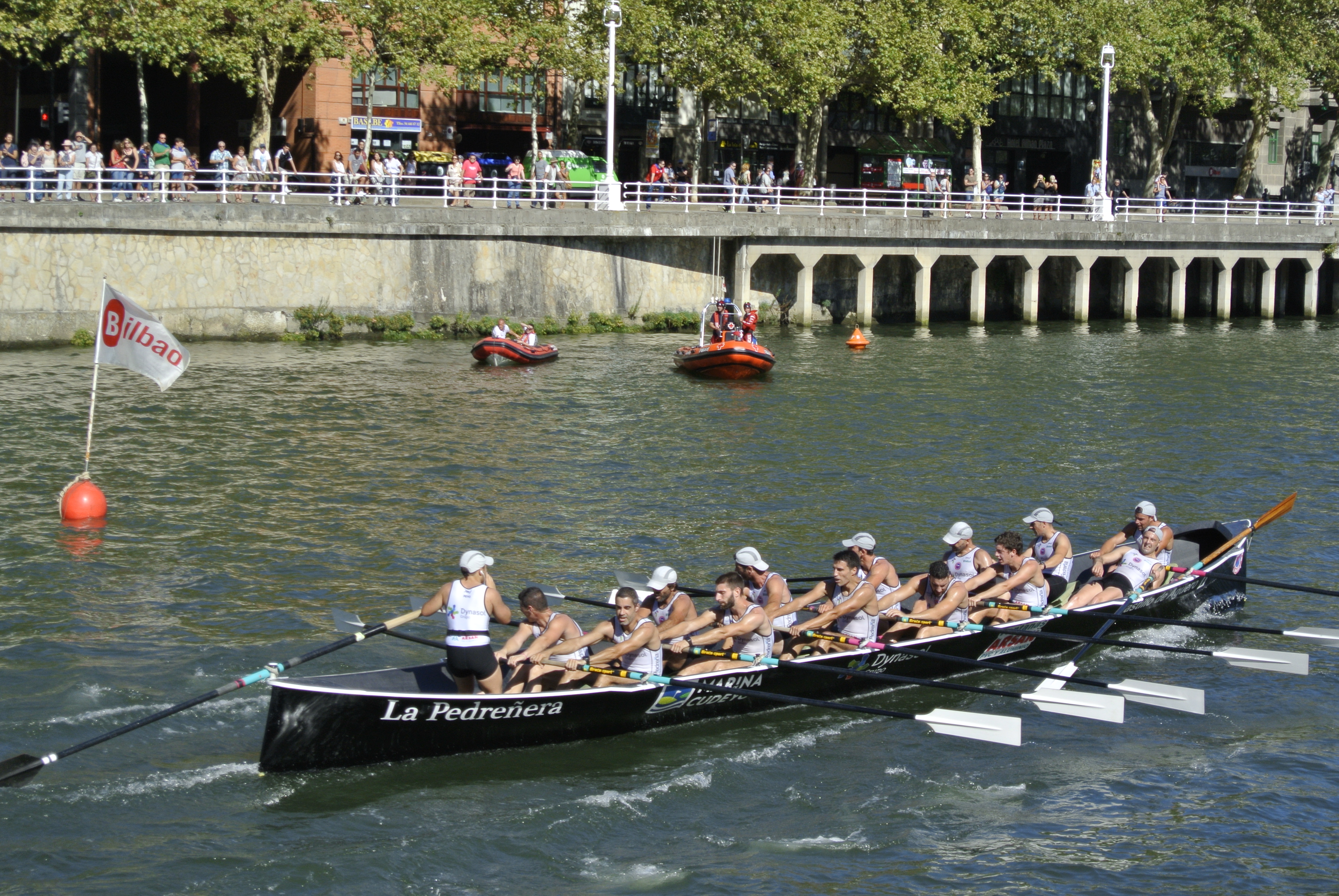 Pedreña en la última regata de la liga ARC 1